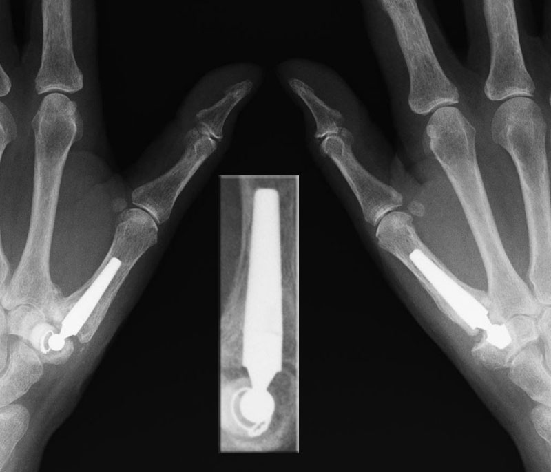 Röntgenaufnahmen von Endoprothesen der Daumensattelgelenke